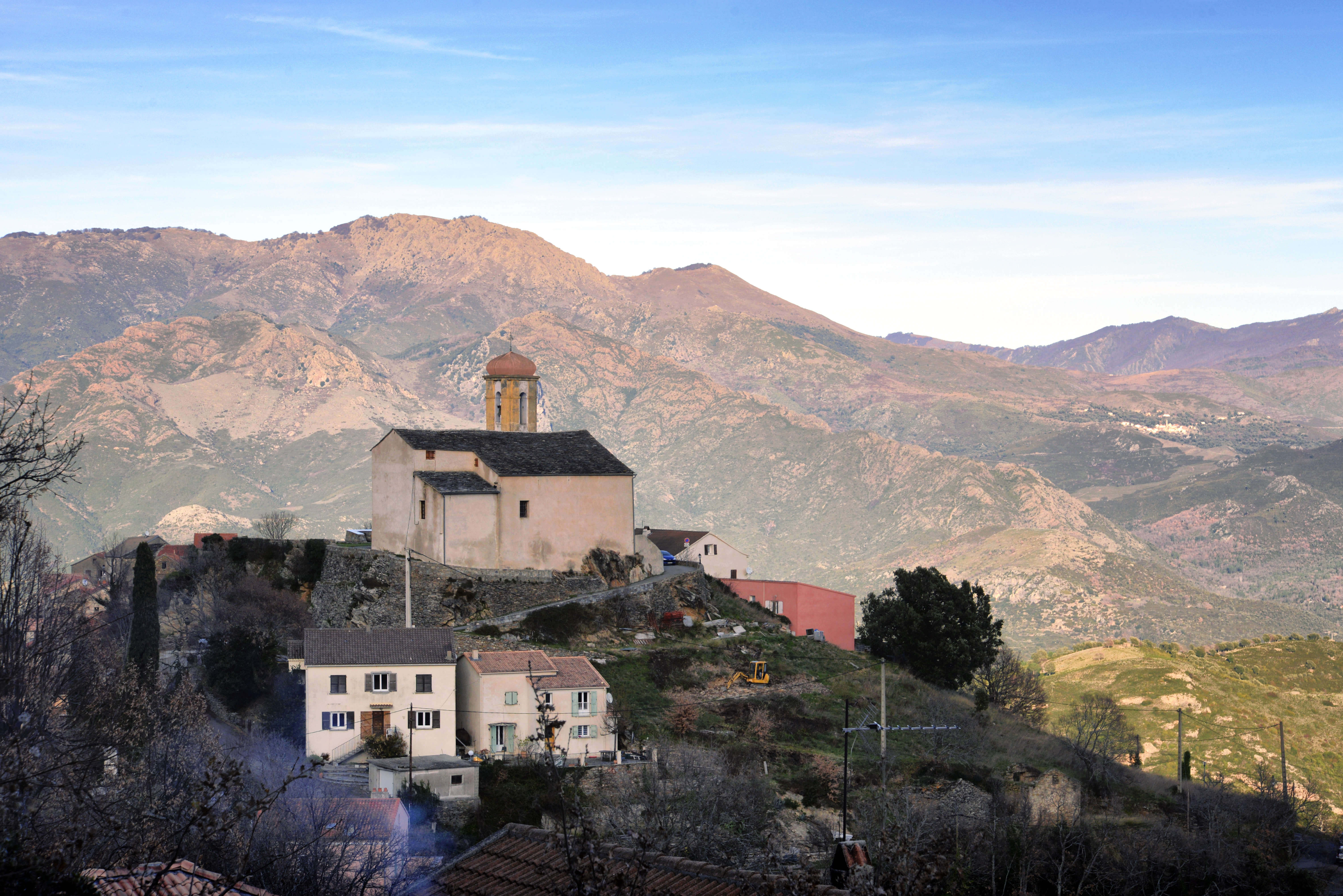 Poggio-di-Venaco, Centre Corse - L'église paroissiale San Quilicu (Saint-Cyr). À l'arrière-plan à droite, le village de Sermano.